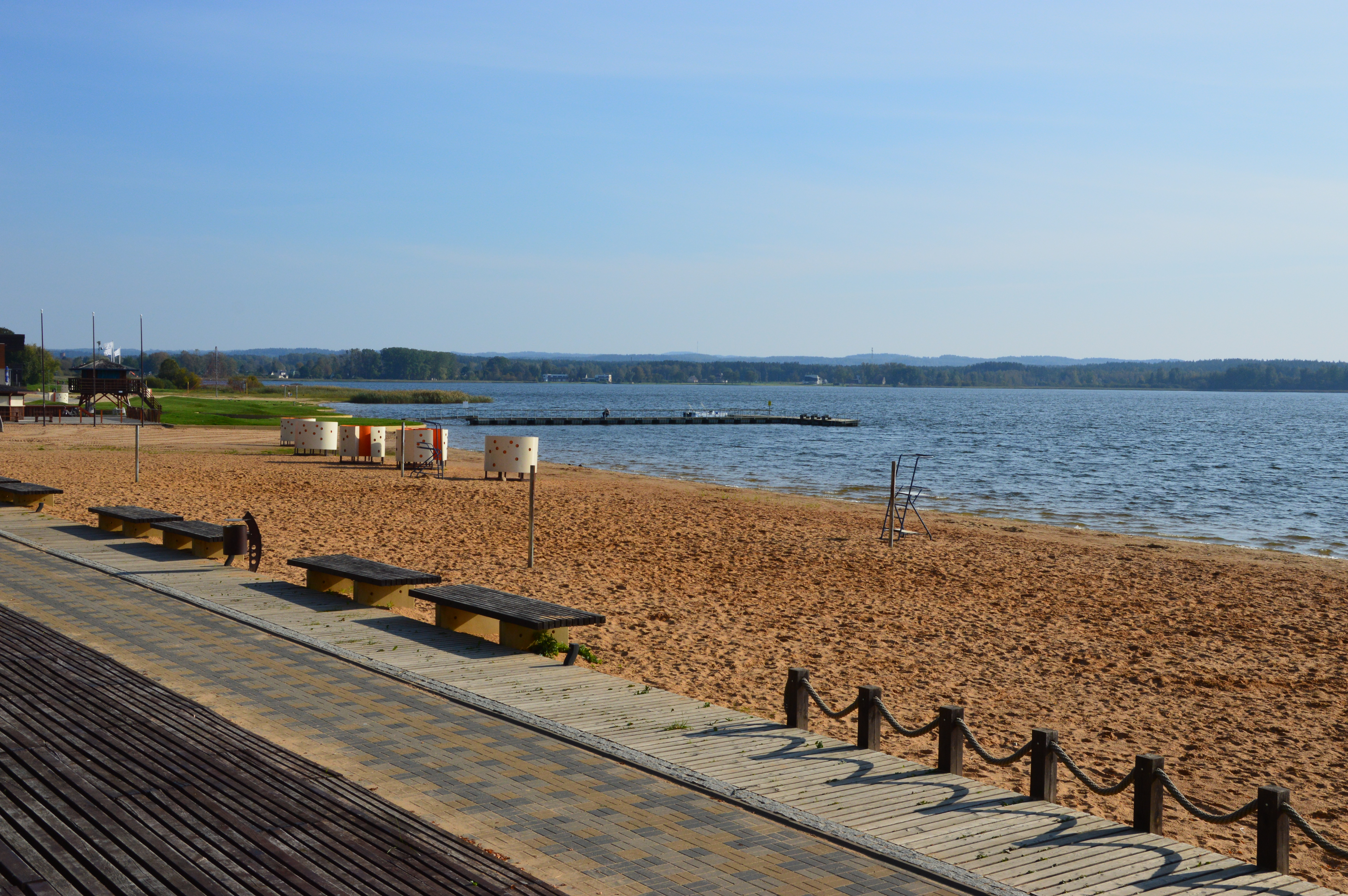 Tamula järve promenaad.